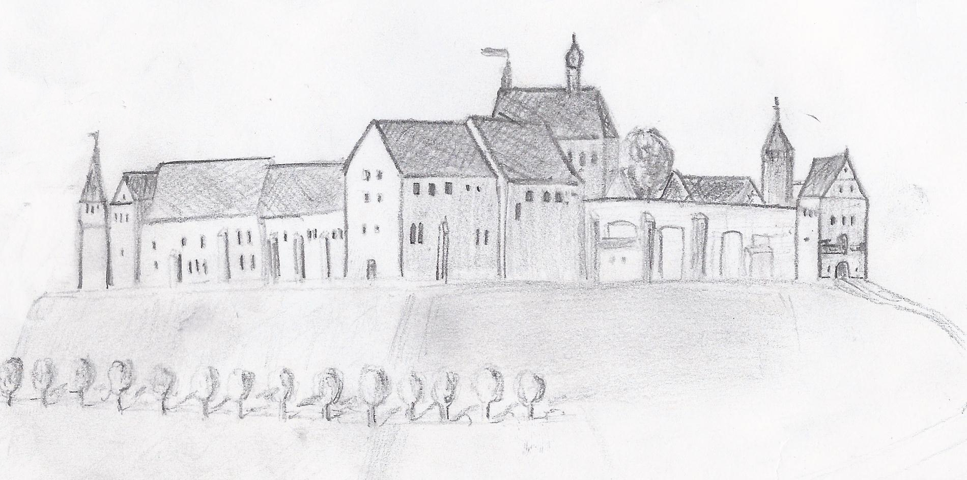 Burg Tecklenburg im 17. Jahrhundert vom Knoblauchsberg aus gesehen, Zeichnung frei nach dem Solmser Stich